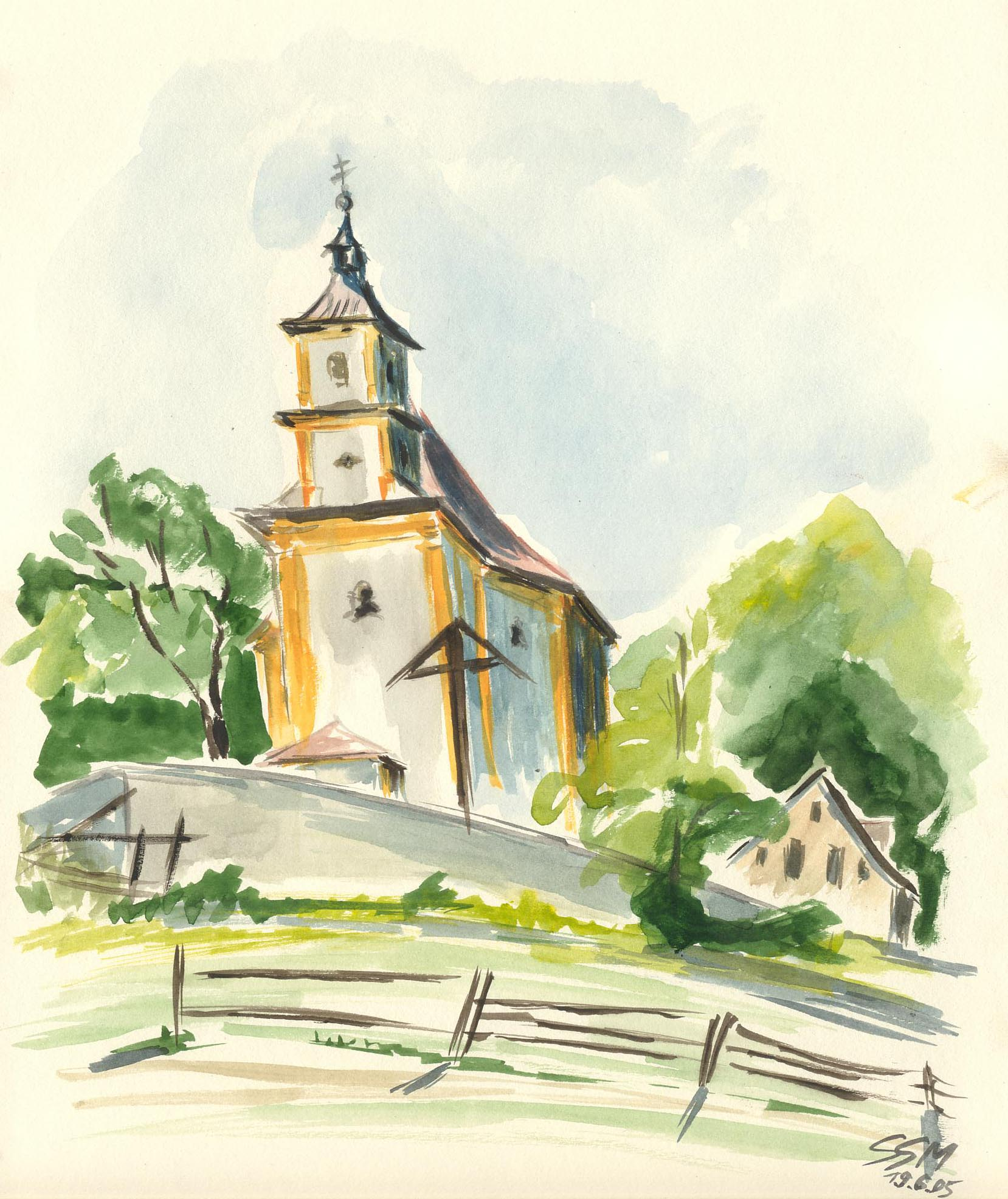 Griesstetten bei Dietfurt an der Altmühl, Wallfahrtskirche zu den "Drei Elenden Heiligen". Aquarell von Siegfried Schieweck-Mauk, Eichstätt